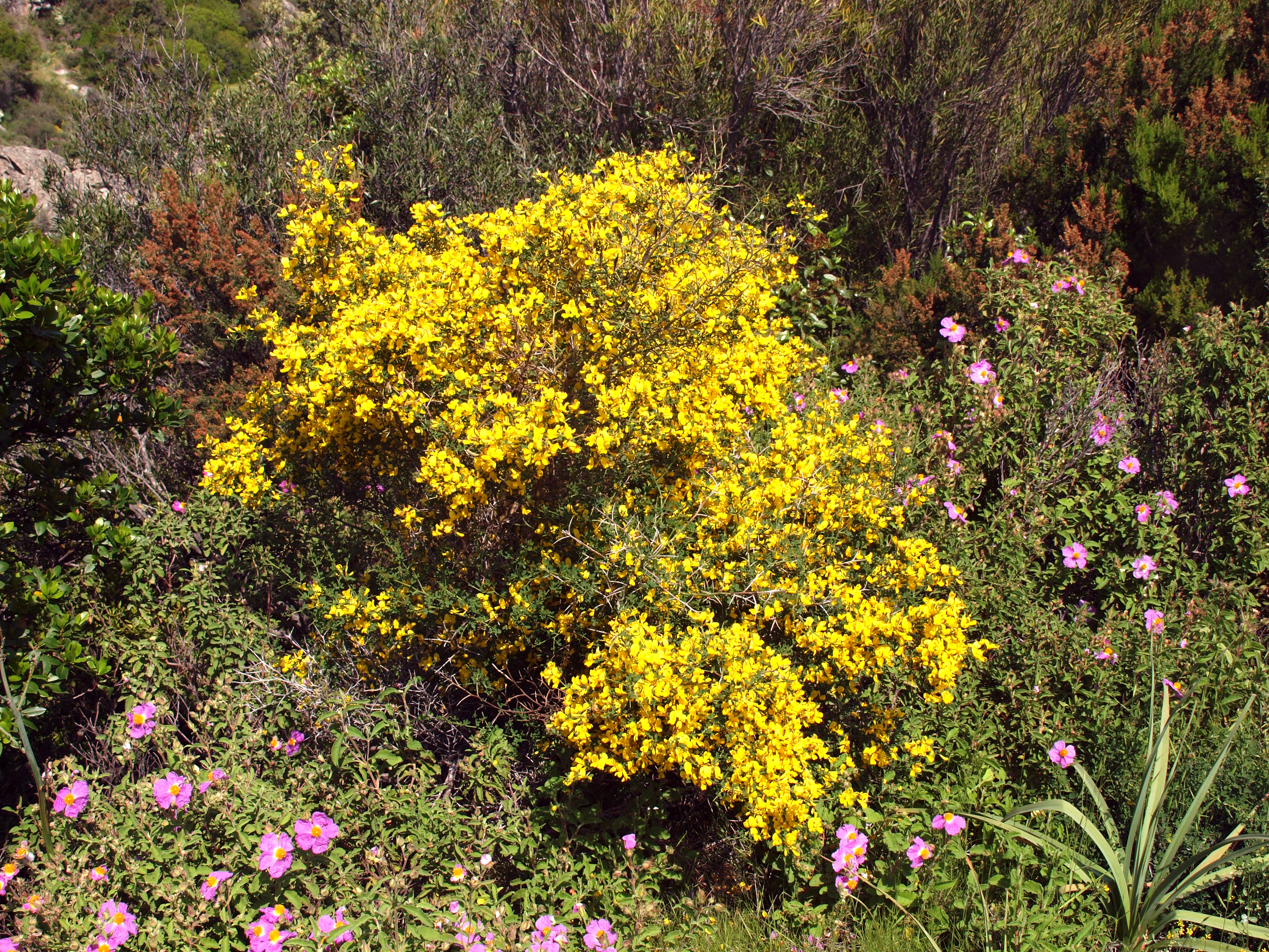 Santo-Pietro-di-Tenda, Nebbio (Corse) - Genêt épineux dans les Agriates